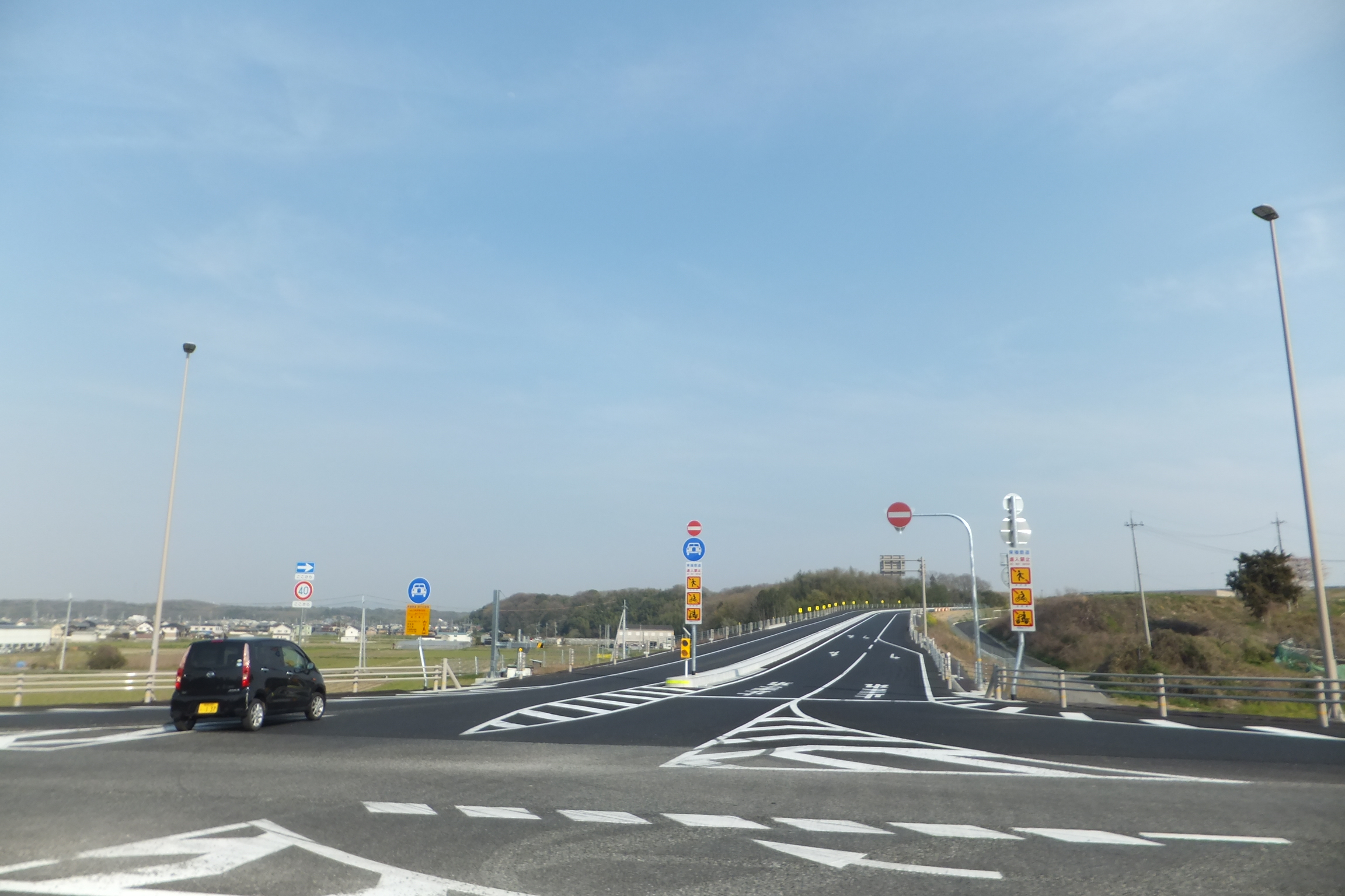 八幡稲美ランプ